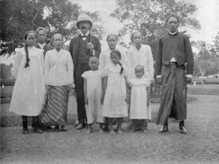 Foto. De regent van Karang - Anjar met zijn familie en Dr. Melchior Treub, Karanganjar, Java.